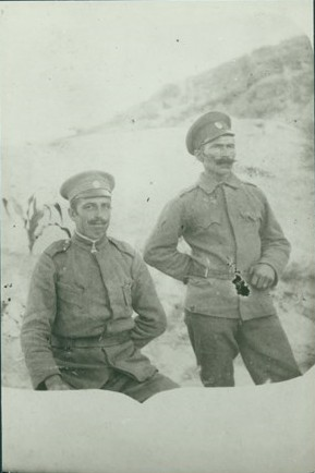 Картечари от 19-и пехотен шуменски полк. Вдясно – Йордан Градинаров, а вляво – Иван Ковачев, участвали в боевете при Тутракан.